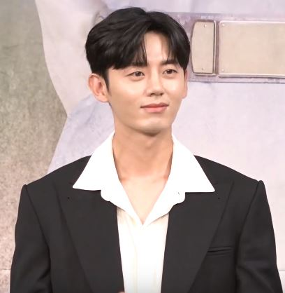 17일 오후 서울 마포구 MBC 골든마우스홀에서 MBC 새 수목 드라마 ‘신입사관 구해령’ 제작발표회가 열렸다.